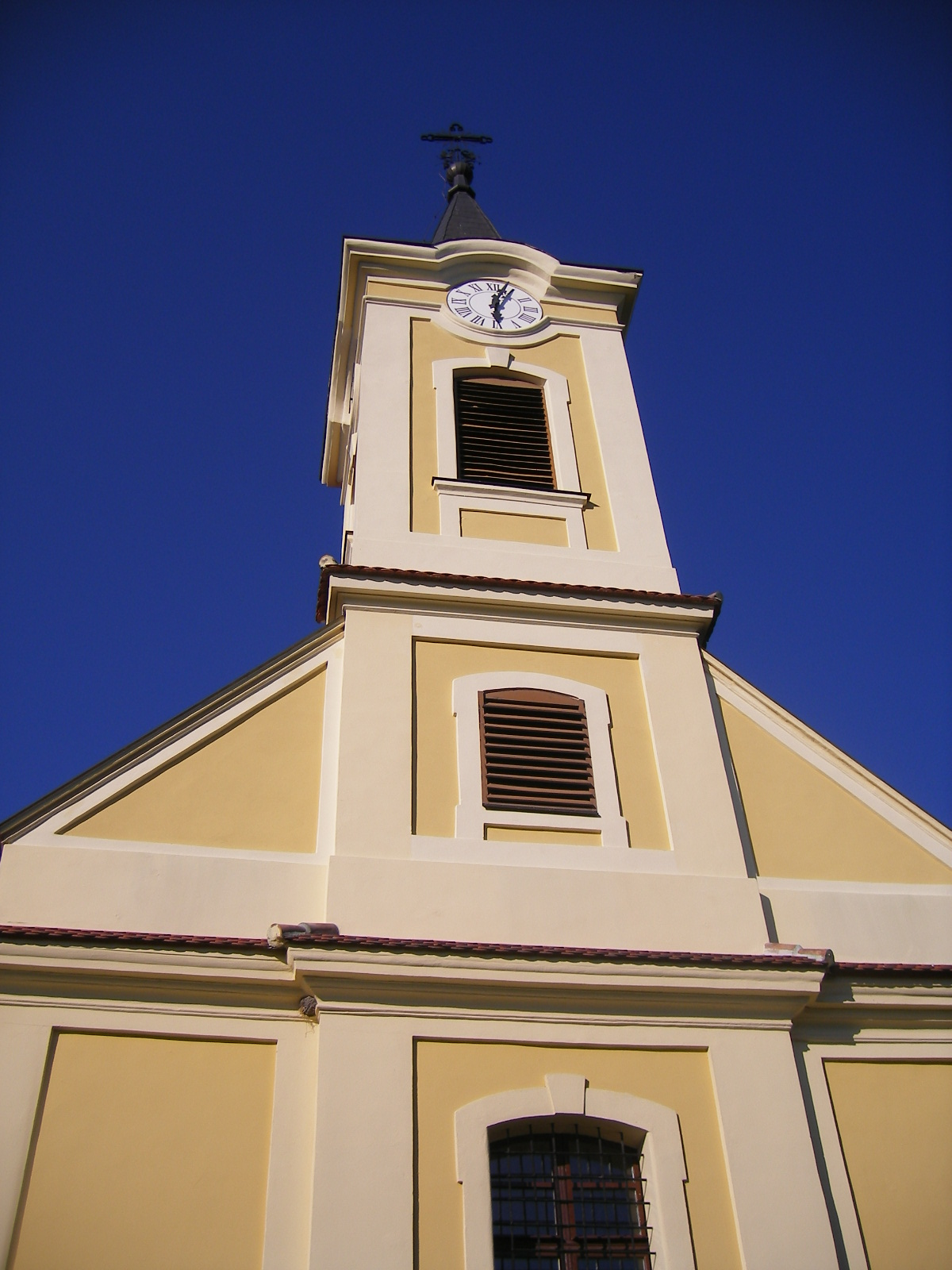 Nagyigmánd - Szent Mihály római katolikus templom